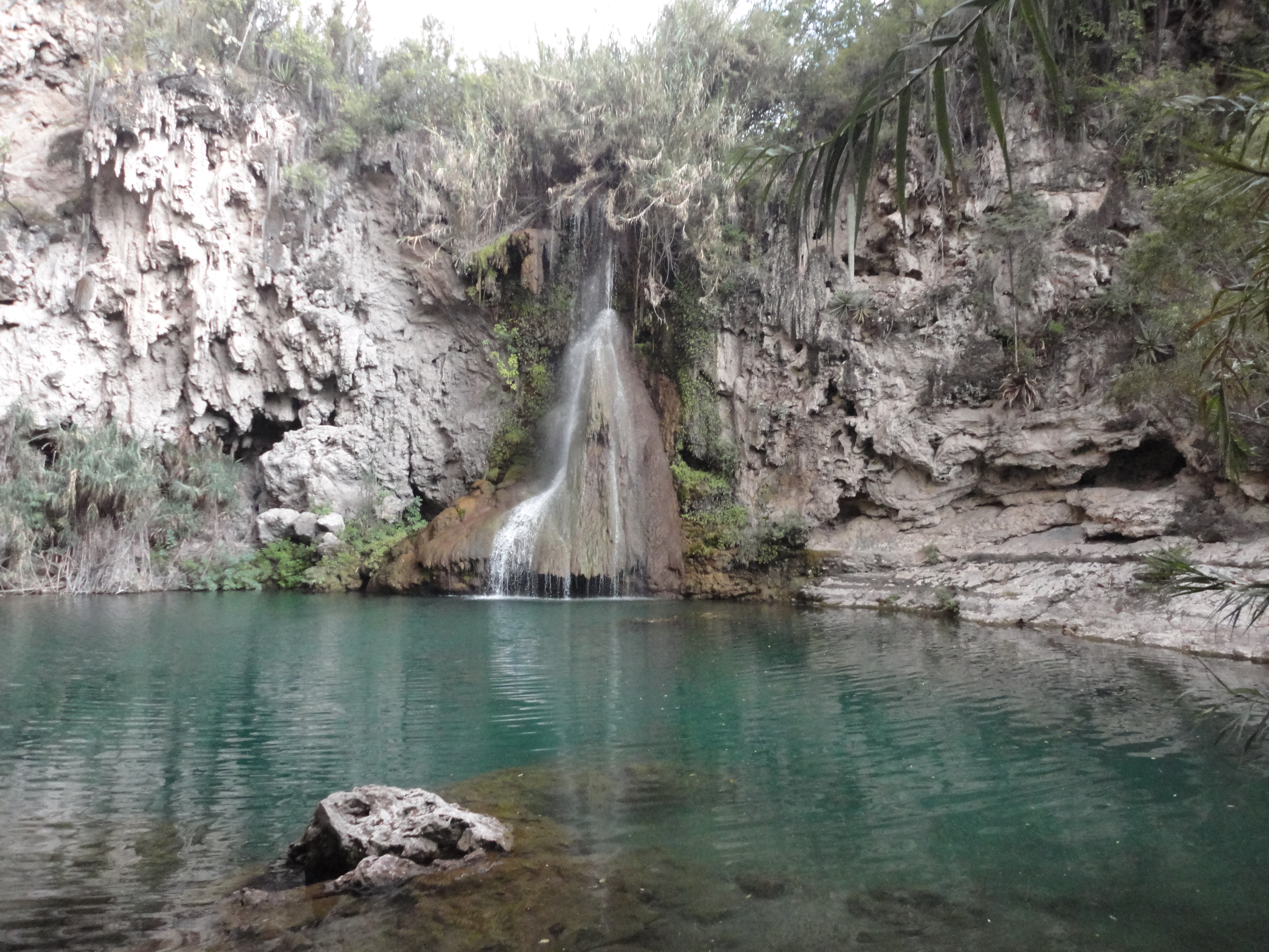 Cascada de los pececitos, en Molcaxac